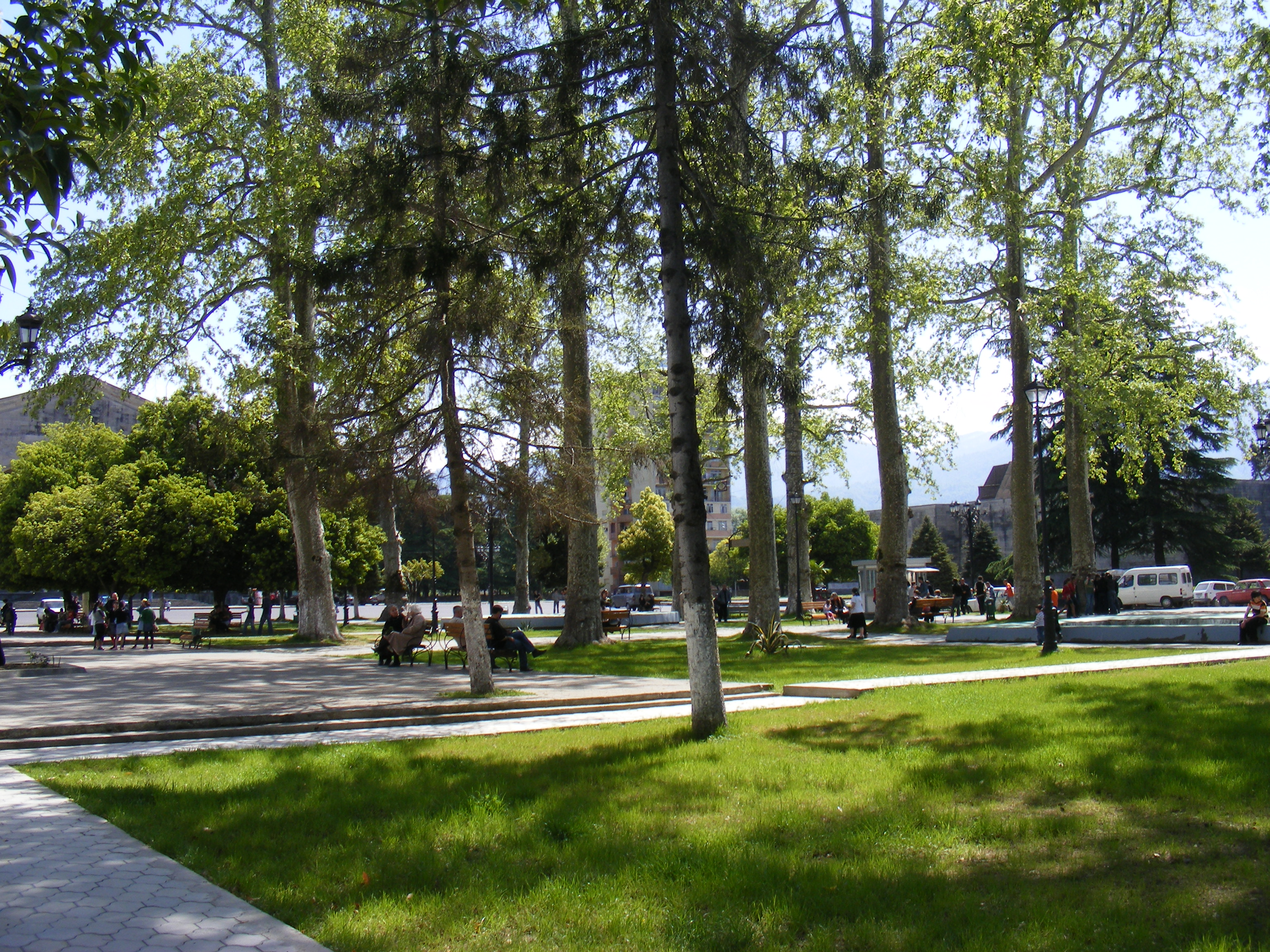 ჭადრების ბაღი